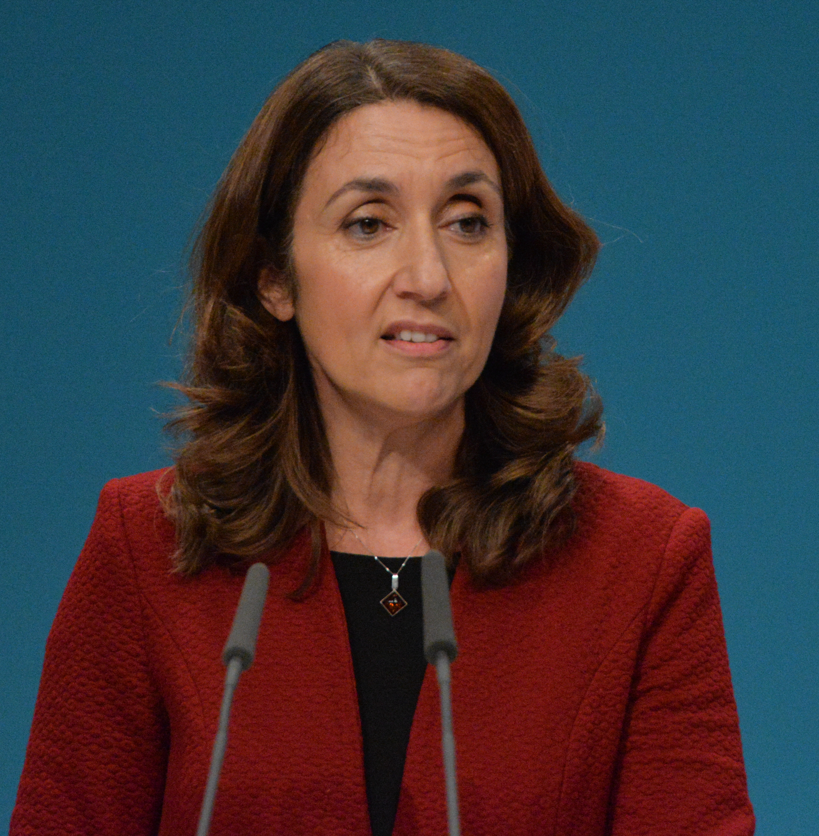 Aydan Özoğuz in 2015 auf dem SPD Bundesparteitag Berlin, 10.-12. Dezember 2015, CityCube, Messe Berlin